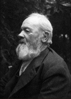 archeologo e paleontologo italiano